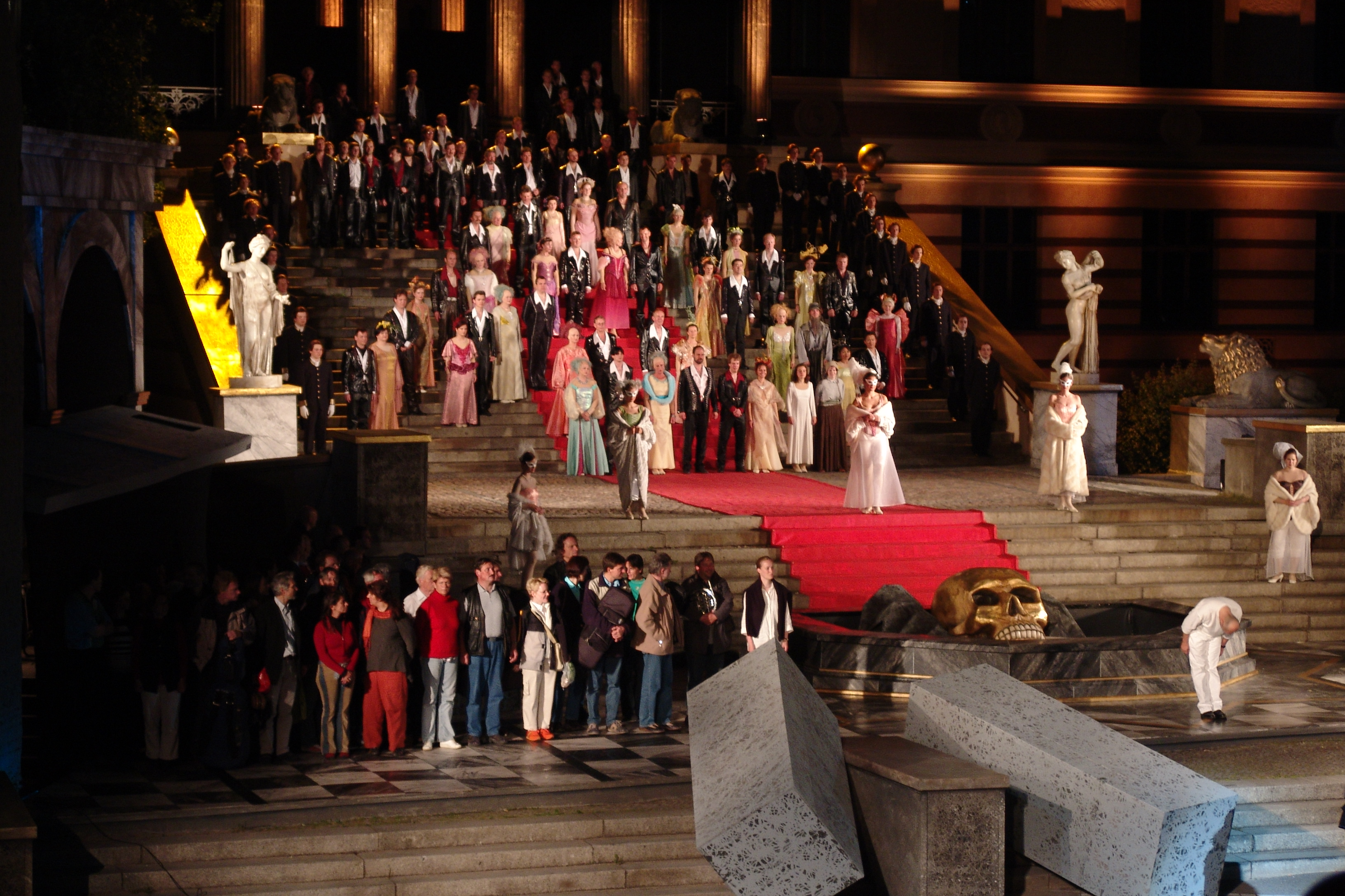 Ensemble des Mecklenburgischen Staatstheaters Schwerin, Schloßfestspiele 2005, Rigoletto, Generalprobe am 15.06.2005, (Schlussapplaus)